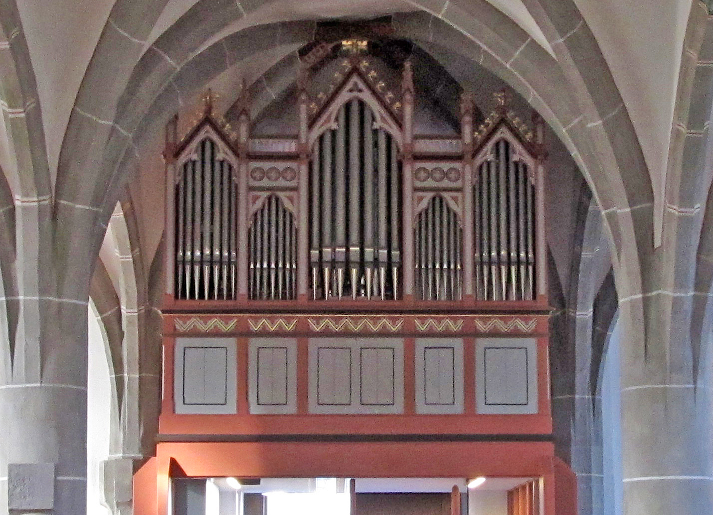 Prospekt der Orgel der evangelischen Martinskirche in Köllerbach, einem Stadtteil von Püttlingen, Saarland